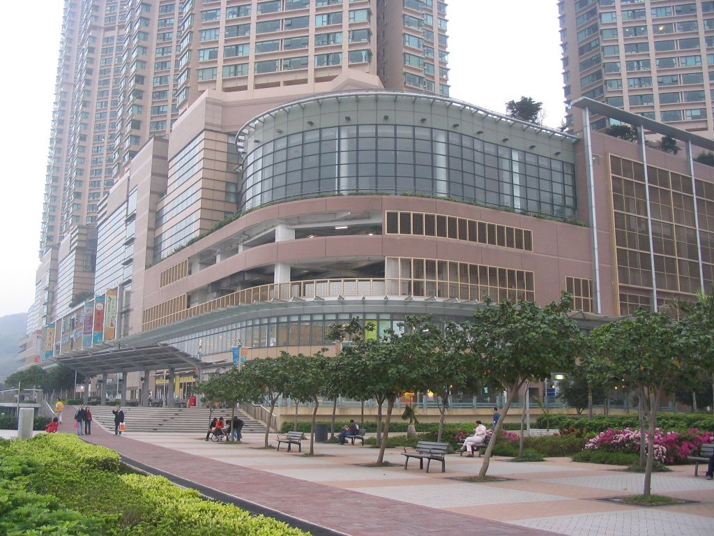 小西灣-藍灣半島 Island Resort, Siu Sai Wan